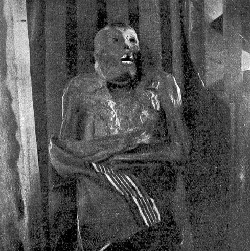 Die Mumie von Johann Philipp von Hohensax (1550–1596) im Glockenturm zu Sennwald